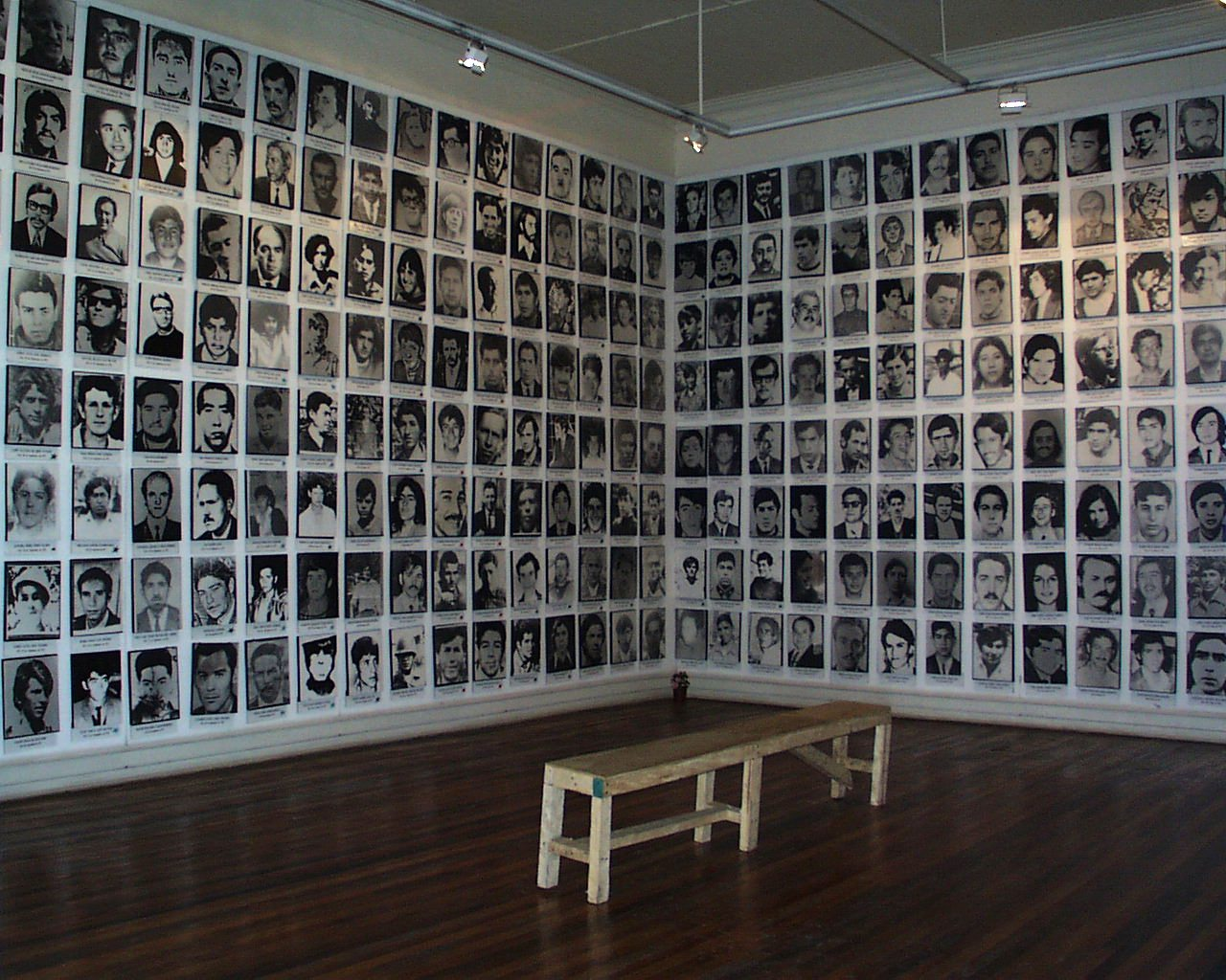 Fotografías de personas desaparecidas tras el golpe de estado del 11 de septiembre de 1973 en Chile. Exposición de la Fundación Salvador Allende con motivo del 30. aniversario de su muerte.